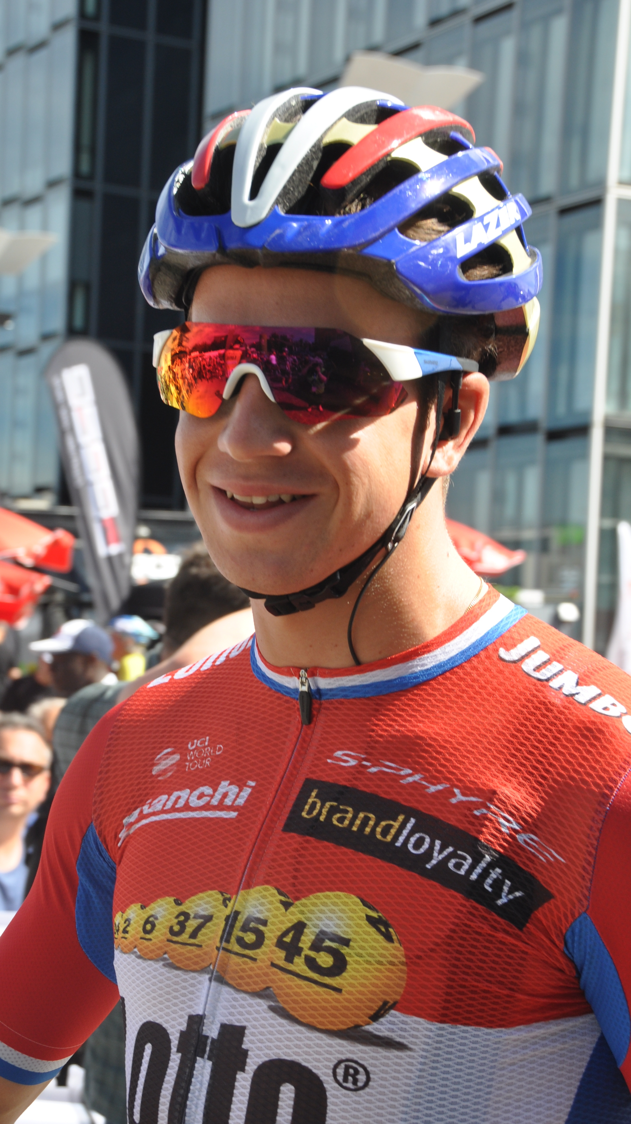 Dylan Groenewegen, niederländischer Radrennfahrer